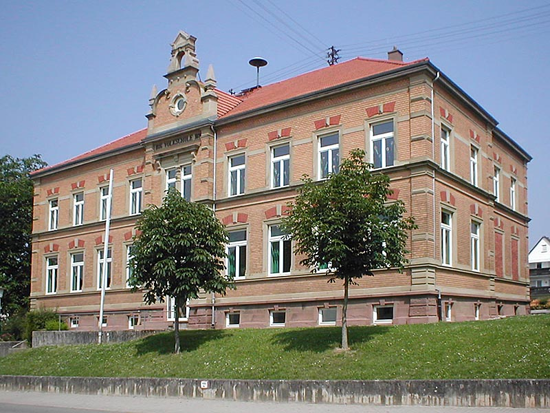 Schulhaus von 1895/96 in Hüffenhardt // School building in Hüffenhardt, germany, built 1895/96